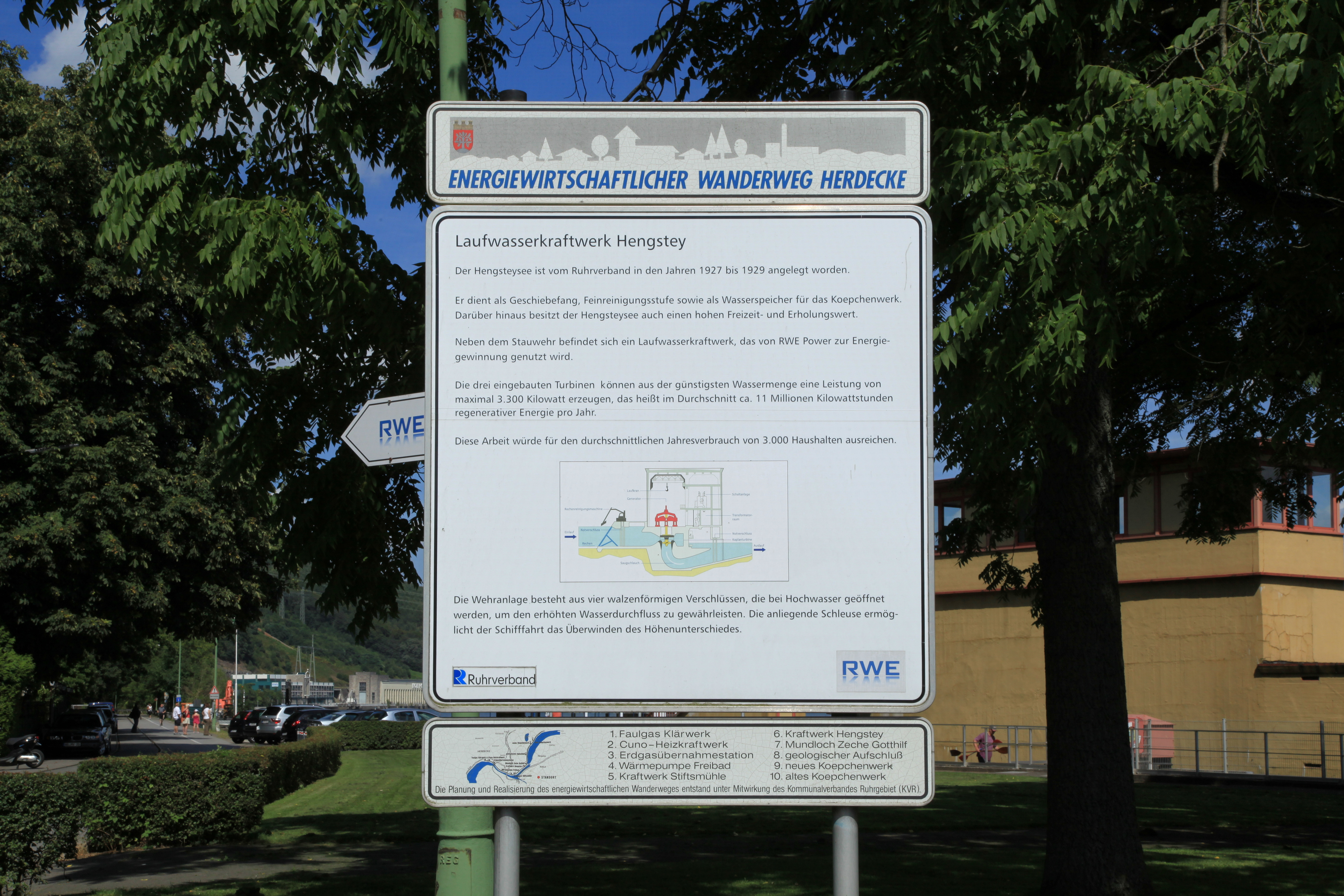 Im Schiffwinkel in Herdecke